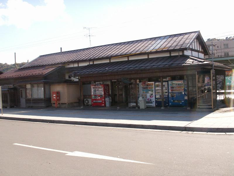 （2006年11月、投稿者Jnr bus撮影）